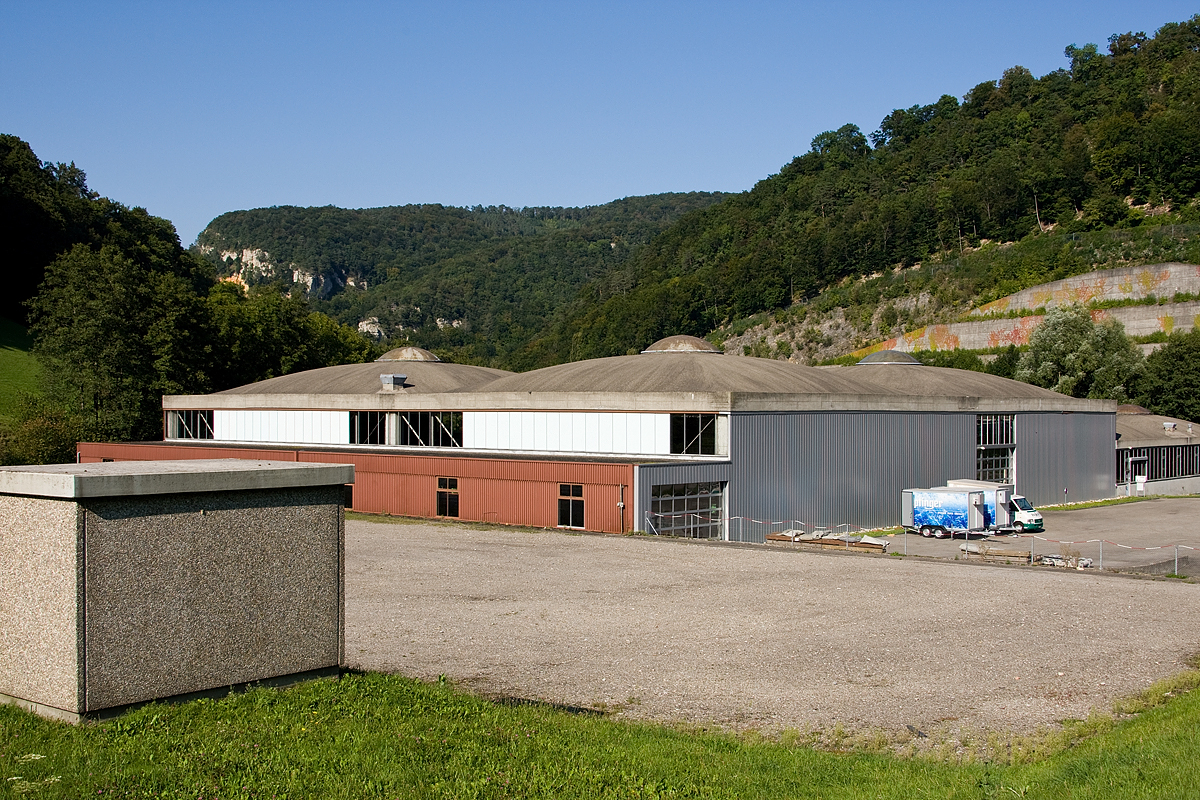 Mineralwasserabfüllanlage in Eptingen